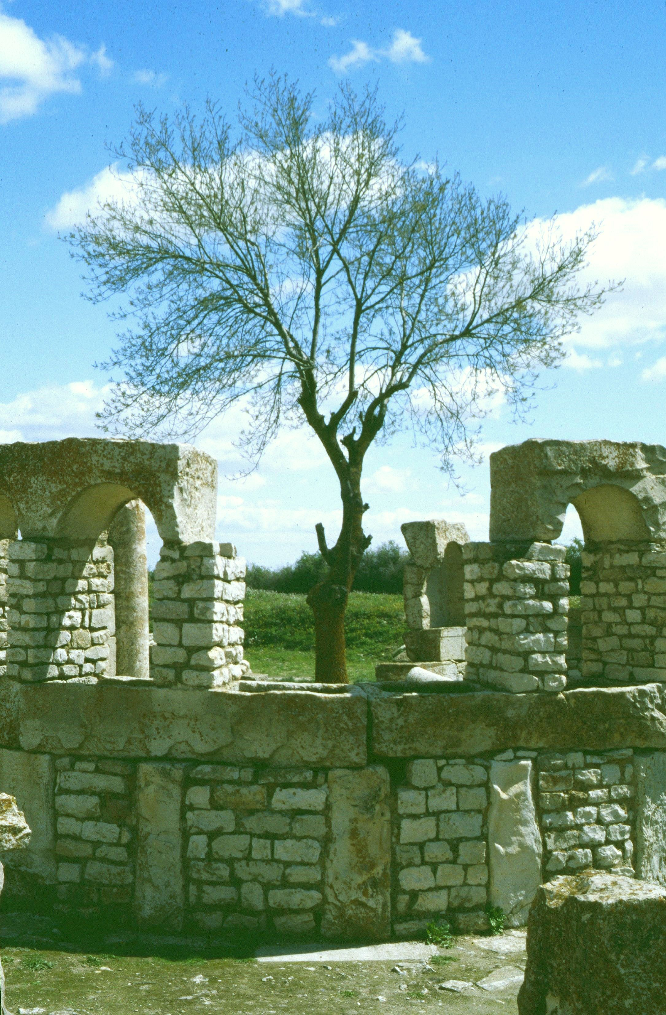 Maktar